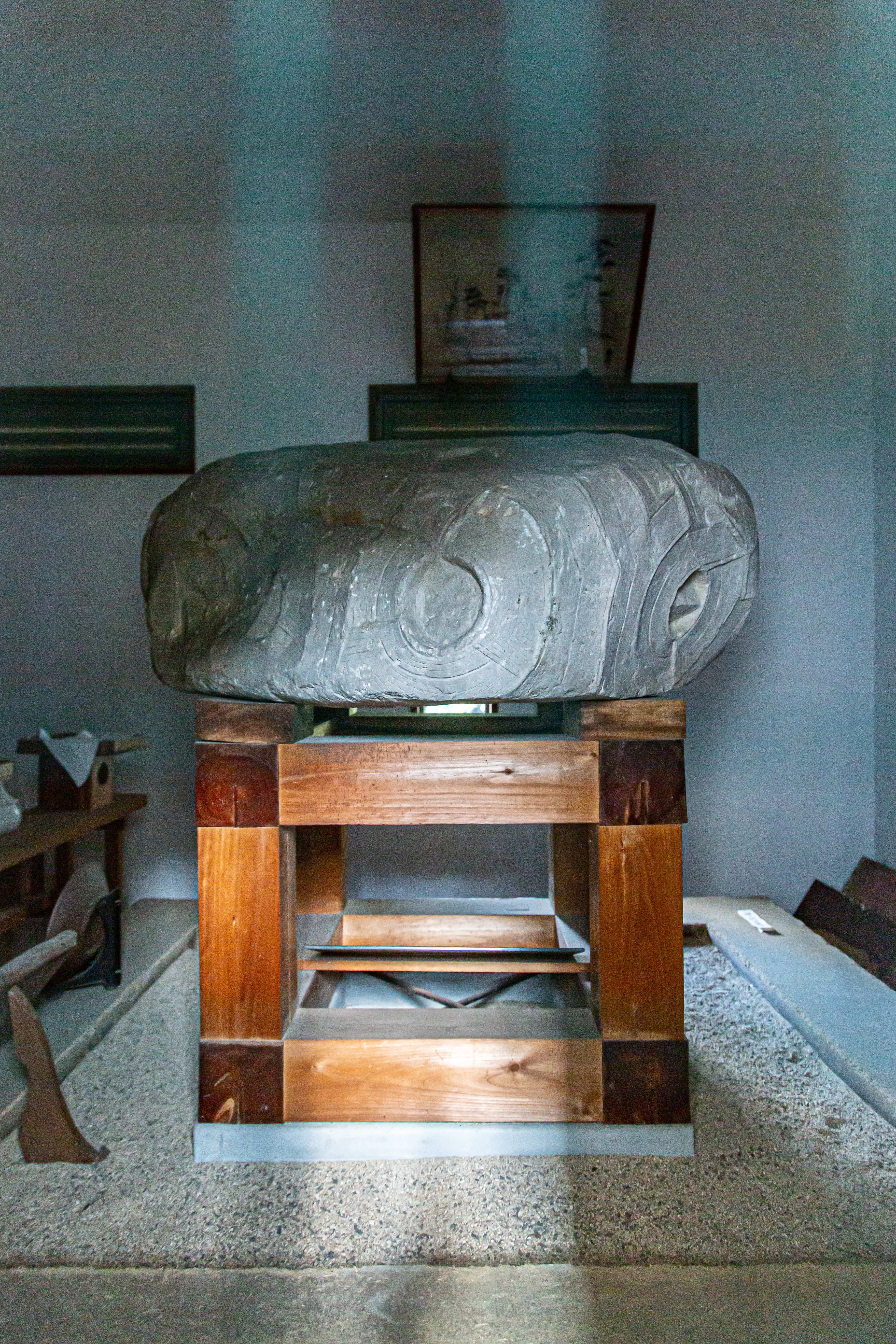 岡山県岡山市北区楯築遺跡内に収蔵されている旋帯文石。